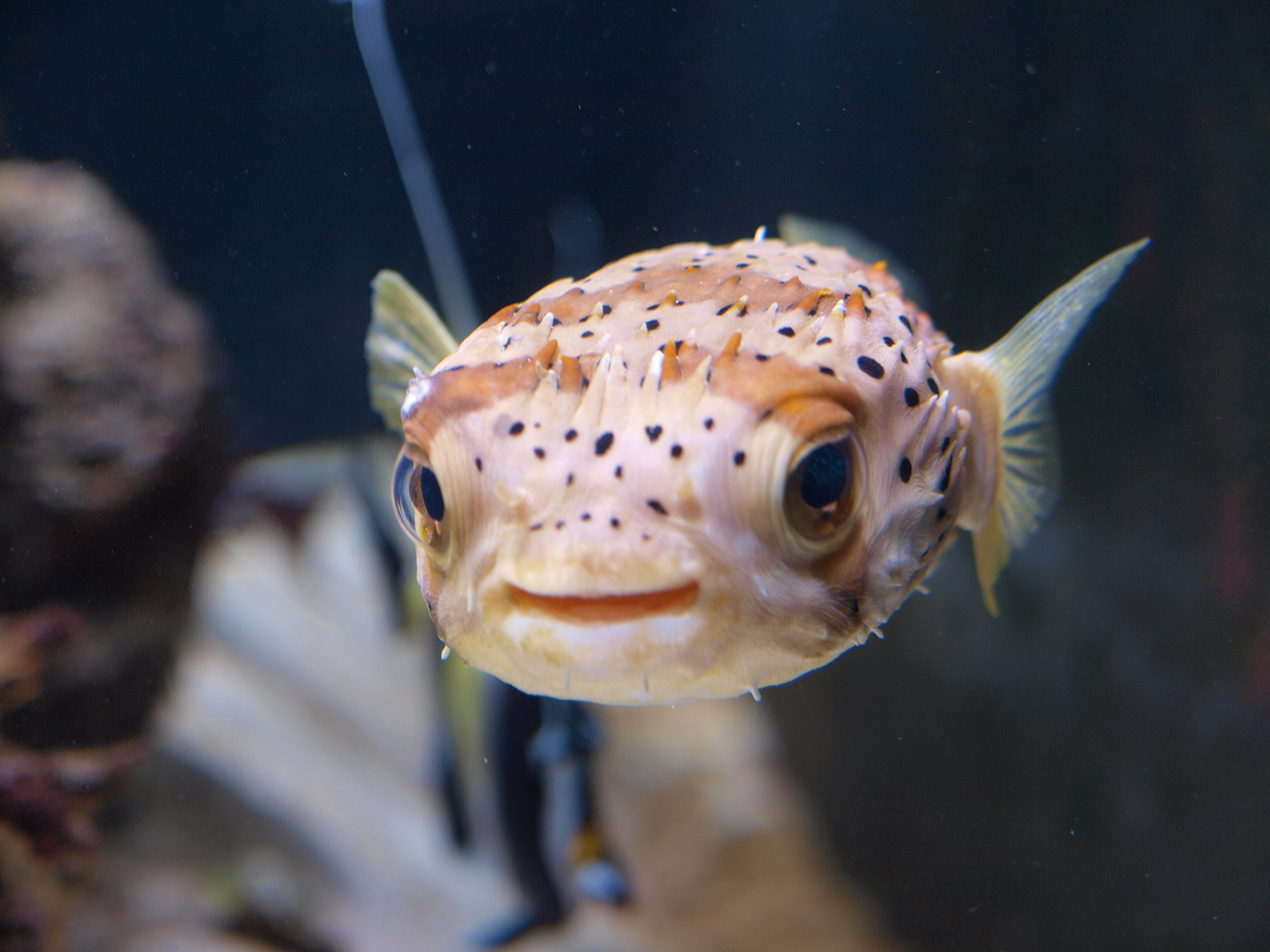 Pez Acuario de Medellín, Colombia (4)